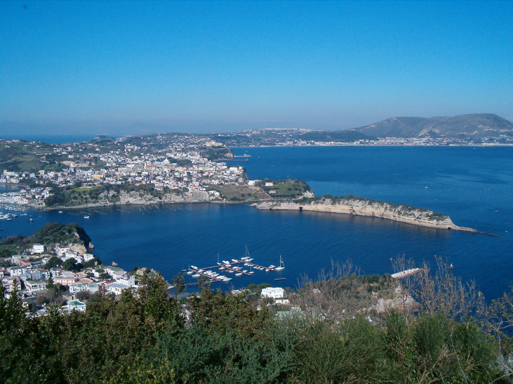 Comune di Bacoli - Veduta da Capo Miseno sul Porto di Miseno che è l'antico vulcano del cui cratere si conserva il bordo nella lunga isola chiamata Punta Pennata. In basso a sinistra, si vede il villaggio di Miseno, frazione del comune di Bacoli il quale si trova di fronte sulla terraferma.